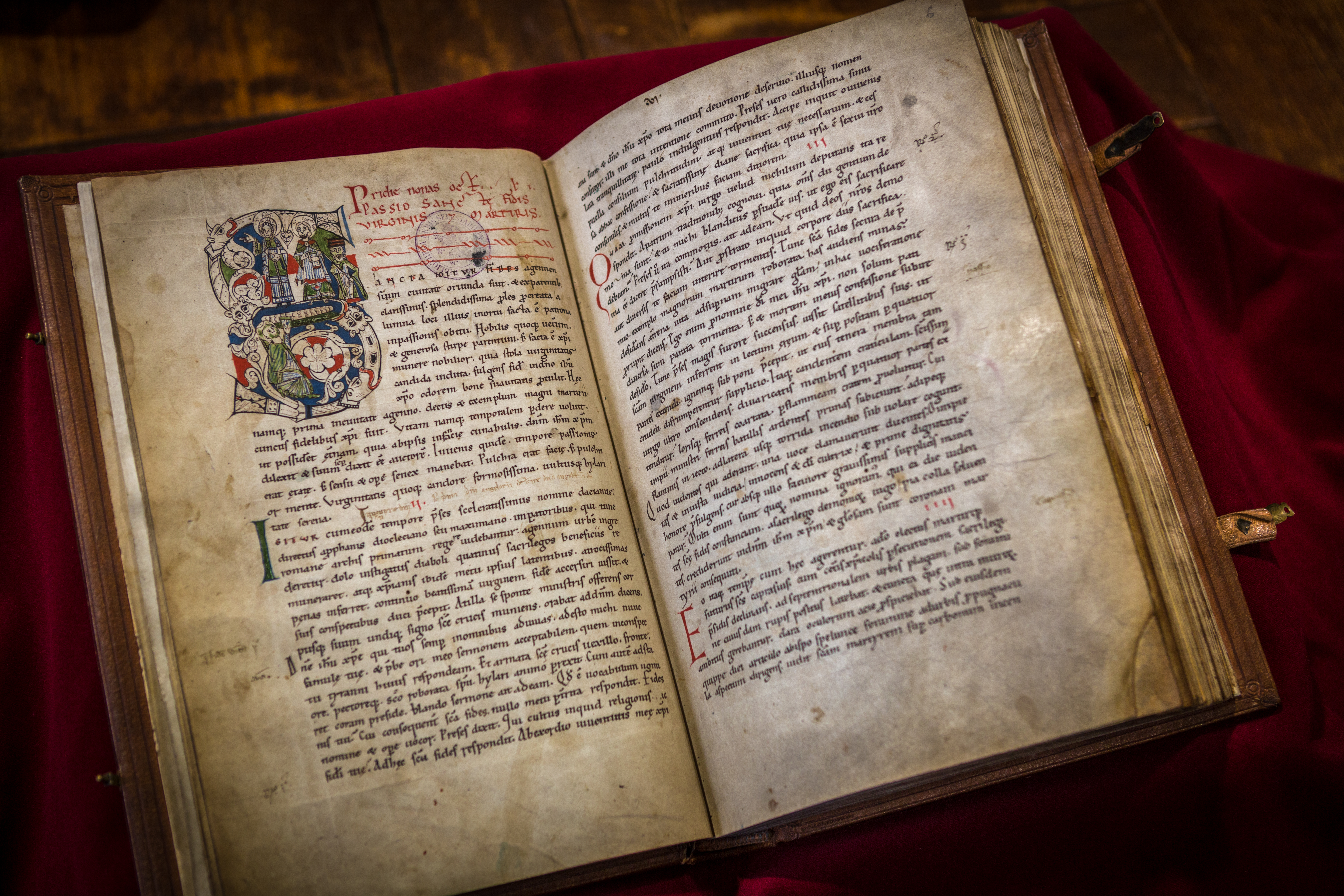 Livre des miracles de Sainte-Foy. Coll. Bibliothèque humaniste de Sélestat.